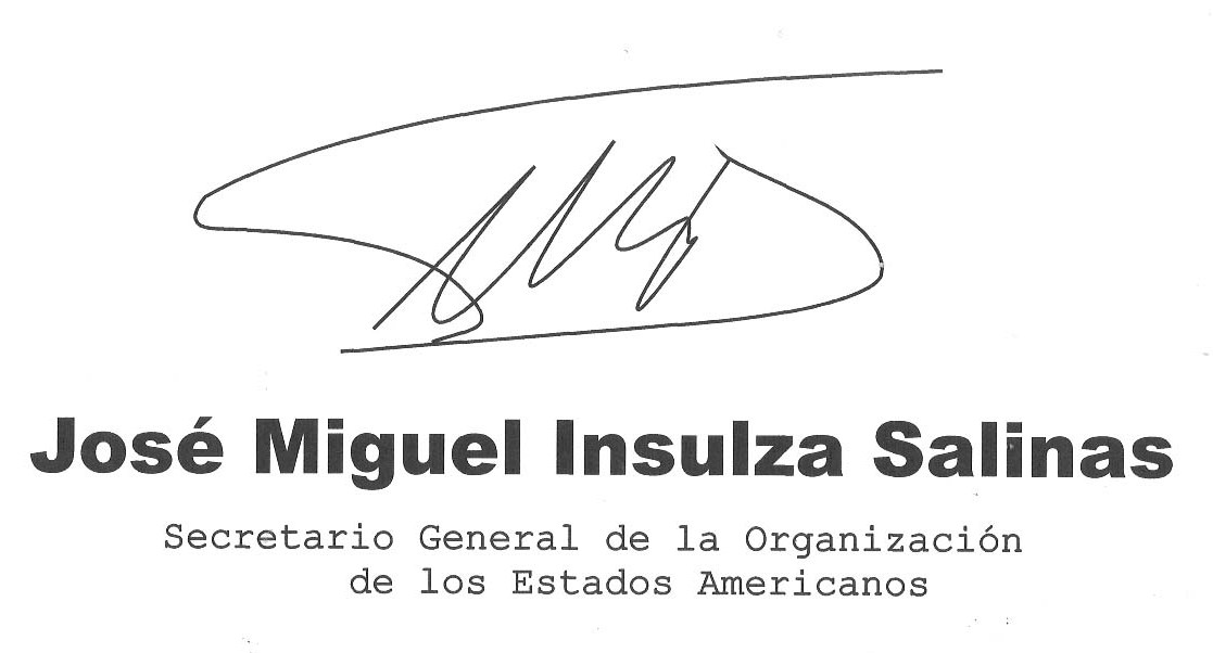 Assinatura e cargo, em espanhol de José Miguel Insulza, ex-Secretário-Geral da Organização dos Estados Americanos